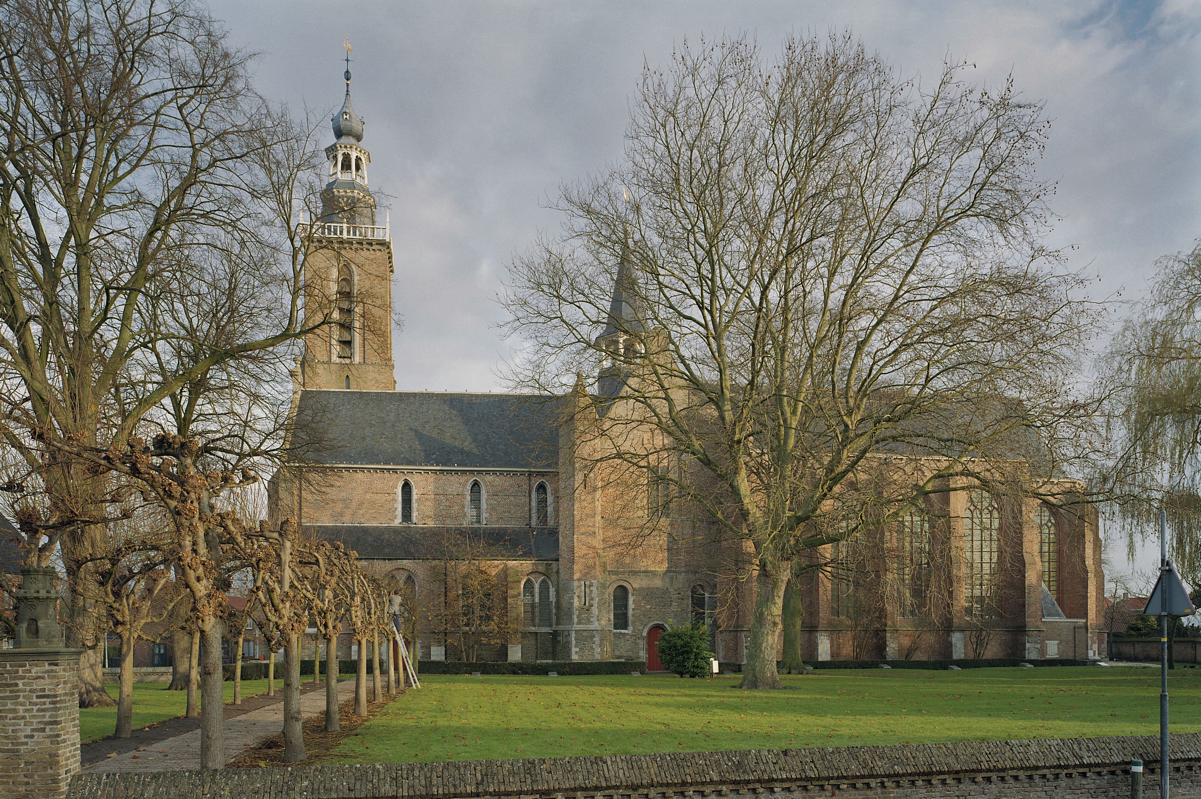 Sint Bavokerk: Overzicht zuidgevel